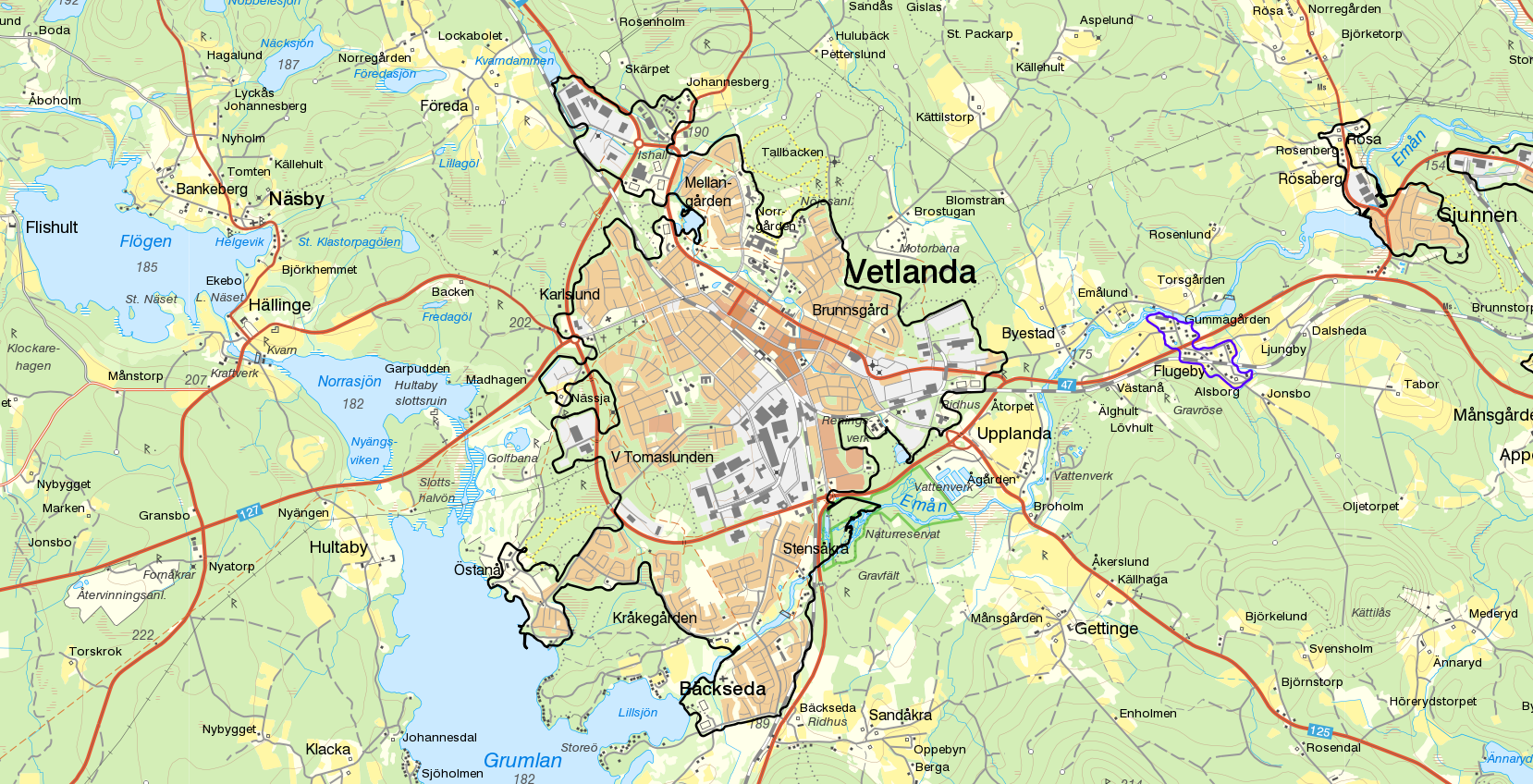 Vetlanda svart gräns 2015. Bakgrundskarta från Lantmäteriet, skala 1:30 236. På kartan syns även en småort (lila gräns) och delar av andra tätorter